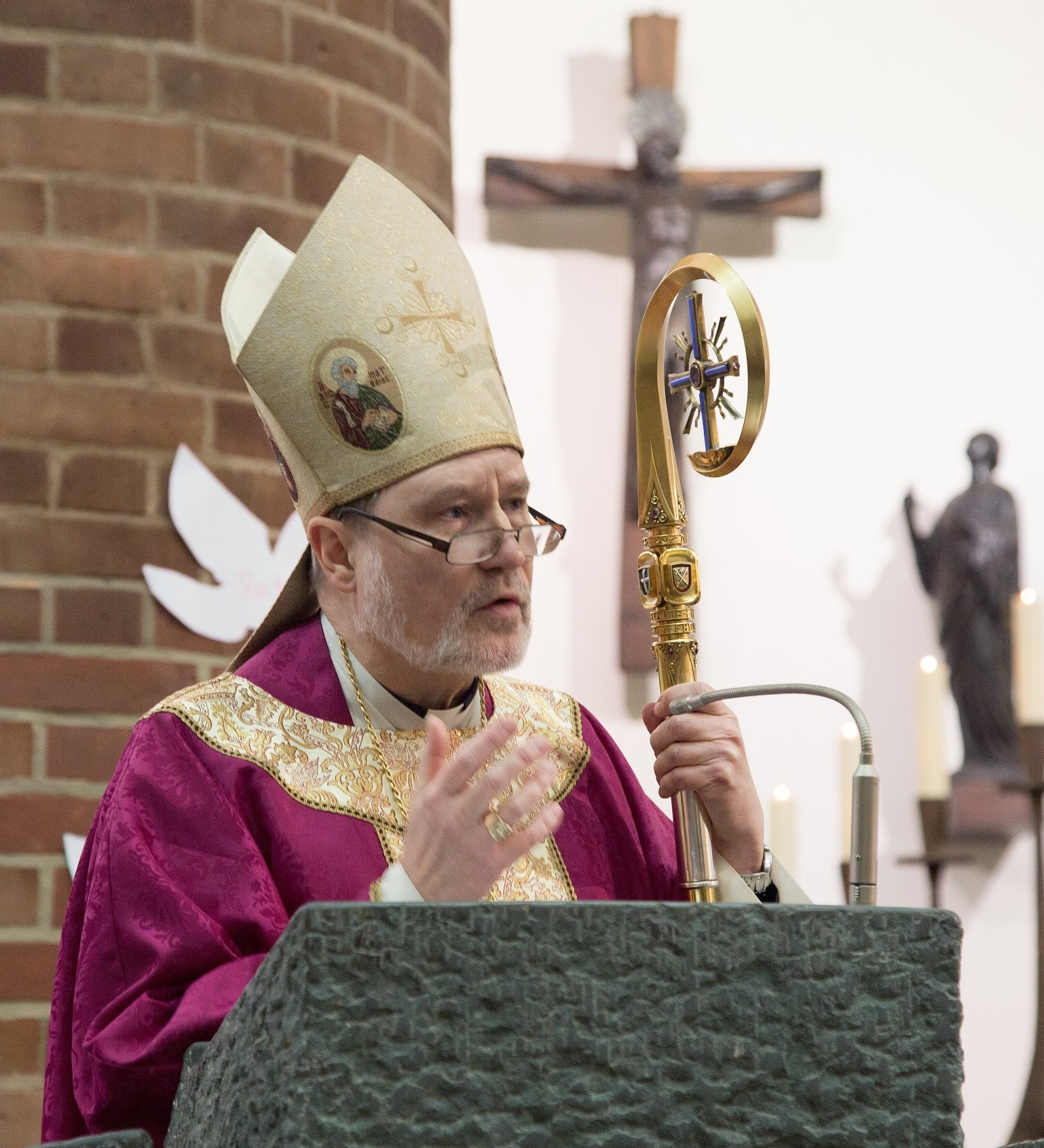 Weihbischof Matthias Heinrich am 26. November 2016 bei der Firmung in der Kirche Maria, Hilfe der Christen in Berlin-Spandau